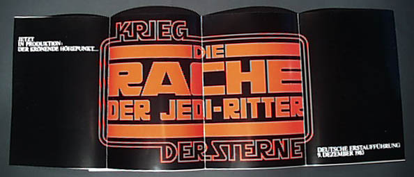 Logo des Films Revenge of the Jedi